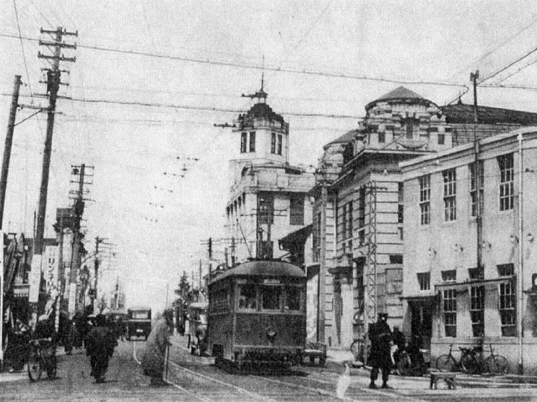 『富山県郷土の山水 呉羽山中心以東編』（村上陽一郎編、1932年（昭和7年）7月、光洋社）所収。当該写真説明文には「西町電車十字路 富山市営市街電車は富山駅前を起点とする本支線の外東部線、呉羽線が相連絡し総亘長一〇粁六一九（六哩六分）で二十七台の車輌を有する」とある。